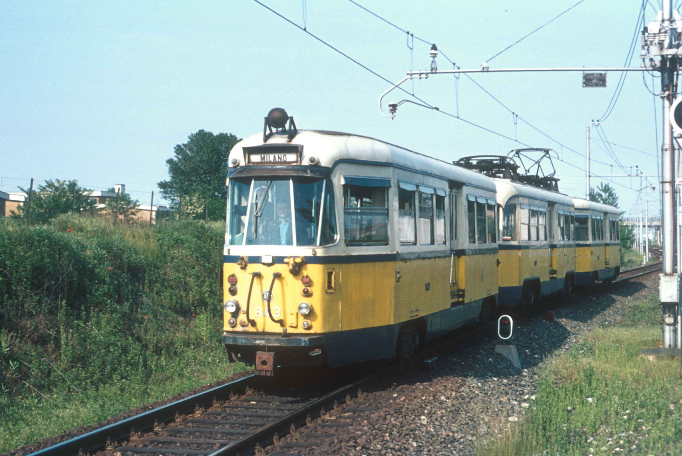 Treno bloccato 843+807+844 dell'ATM di Milano, in servizio sulla linea celere dell'Adda presso Gorgonzola.